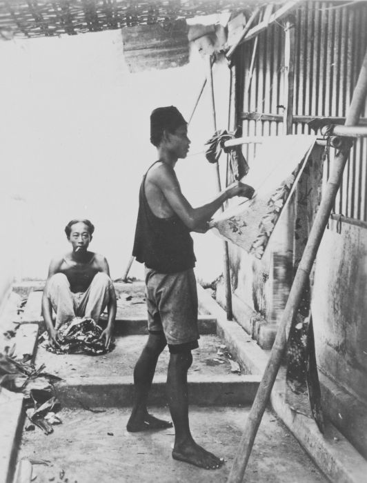 Foto. Een man staat bij een doek waarop hij een patroon maakt in was